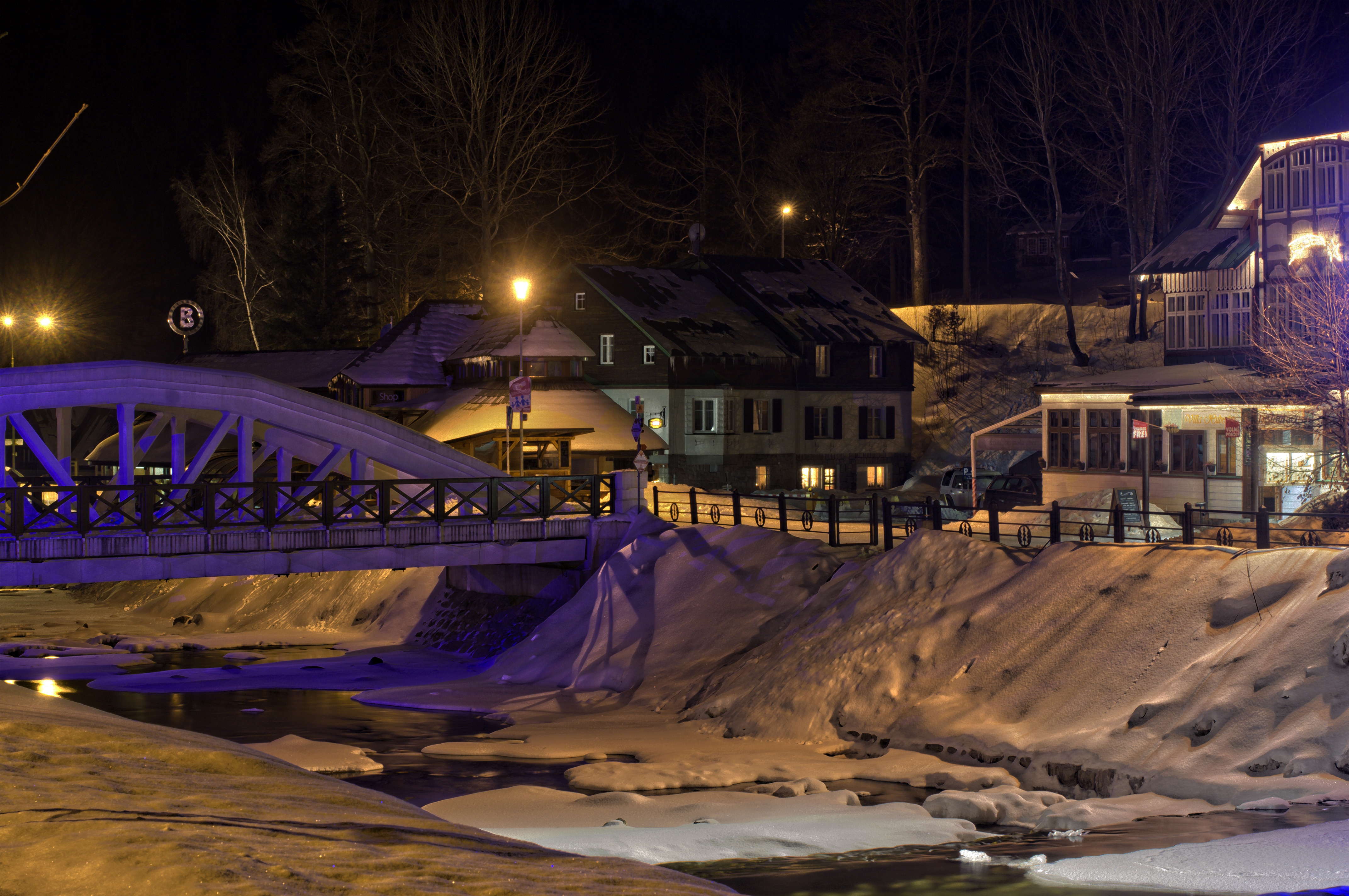 Špindlerův Mlýn v noci